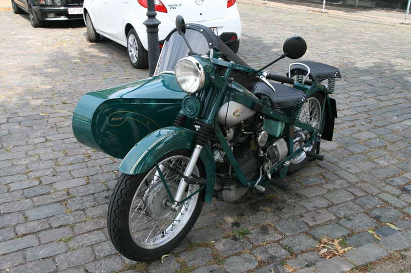 Nimbus med sidevogn